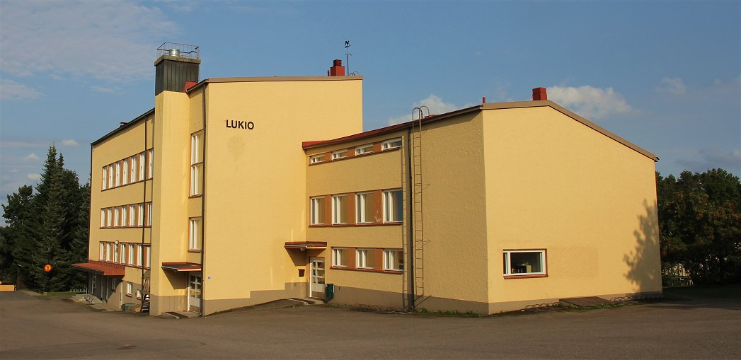 Leppävirran lukio on Leppävirralla toimiva lukio.